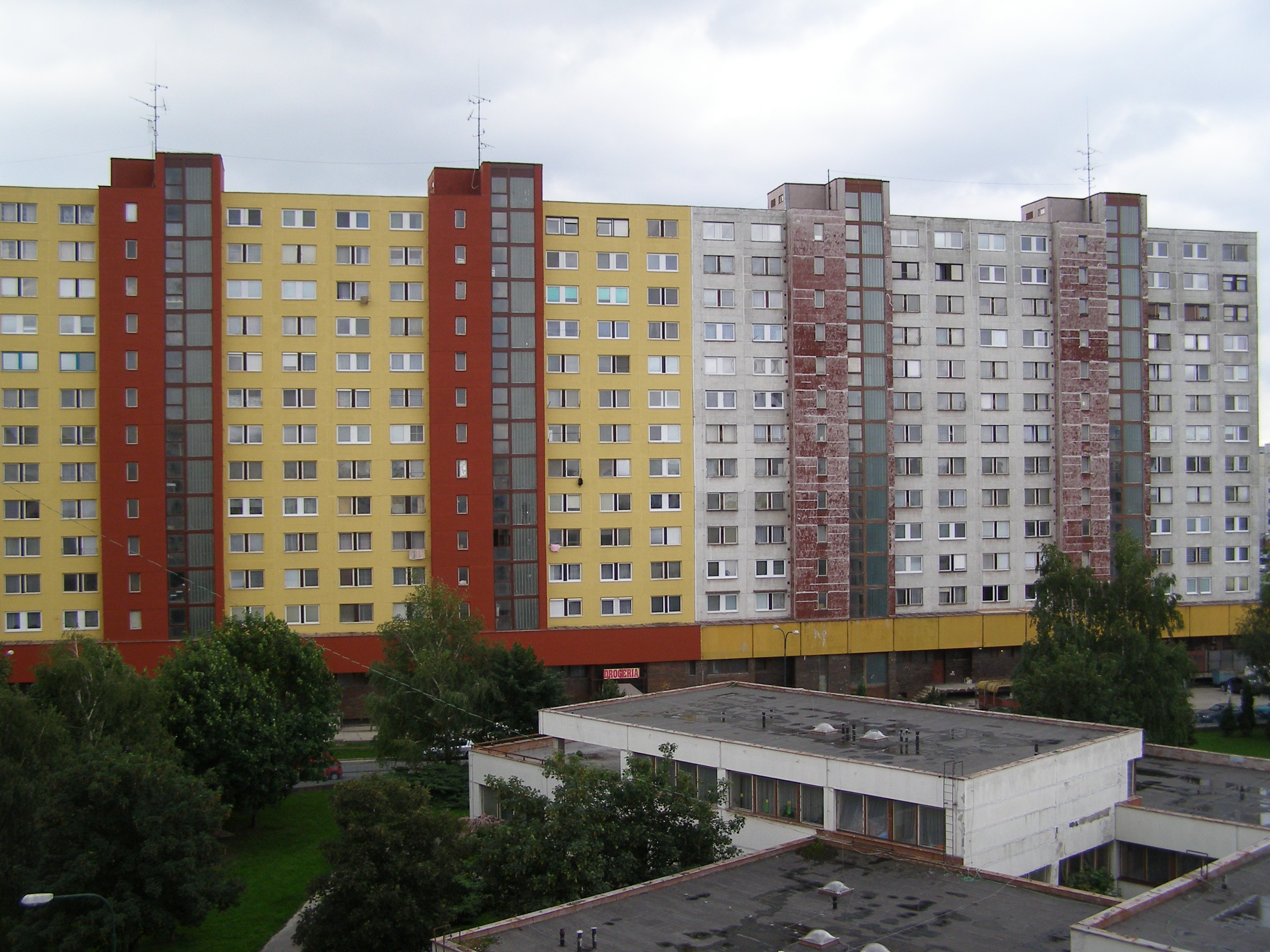 Fedinova 10-24, Petržalka, Bratislava